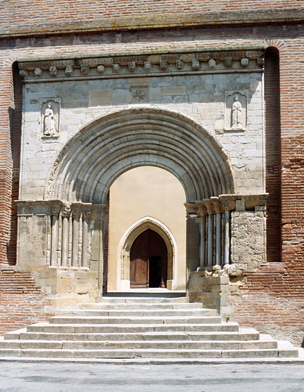 France - Languedoc - Aude - Église Saint-Saturnin de Belpech